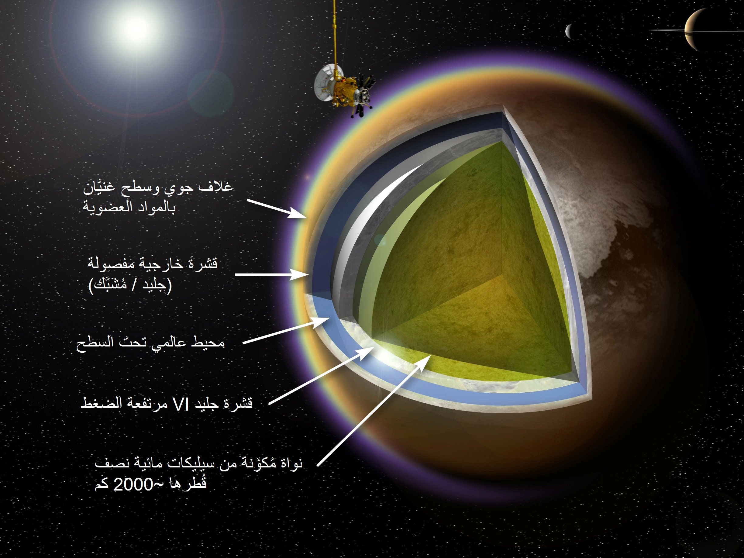 صورة توضح طبقات القمر تيتان